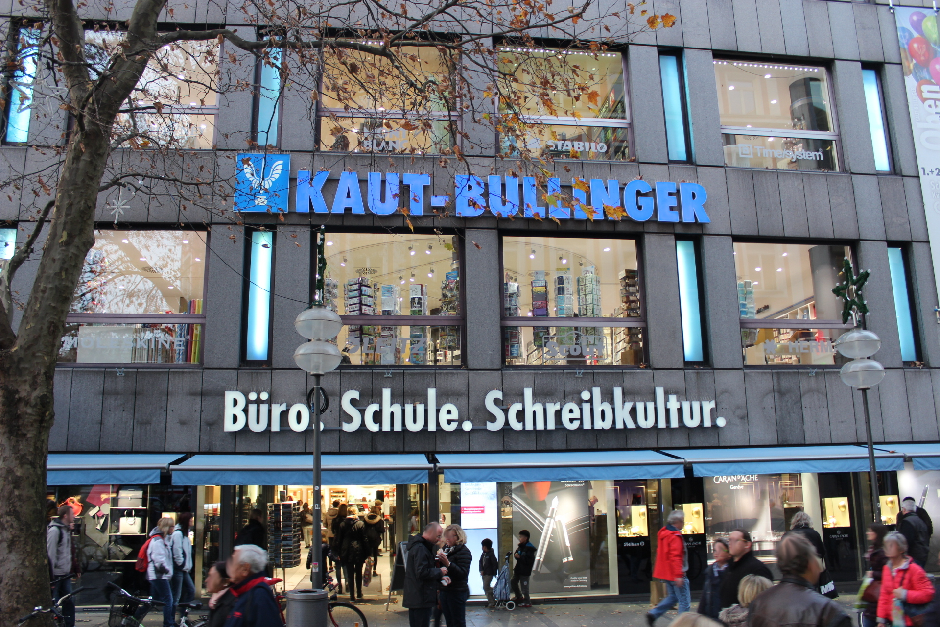 Kaut-Bullinger, München, November 2015